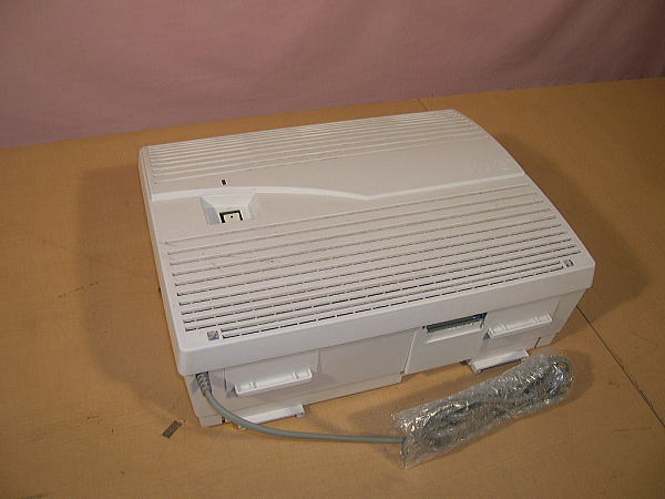 内線電話の鳴り分け、番号の割り振りをする通称名（主装置）